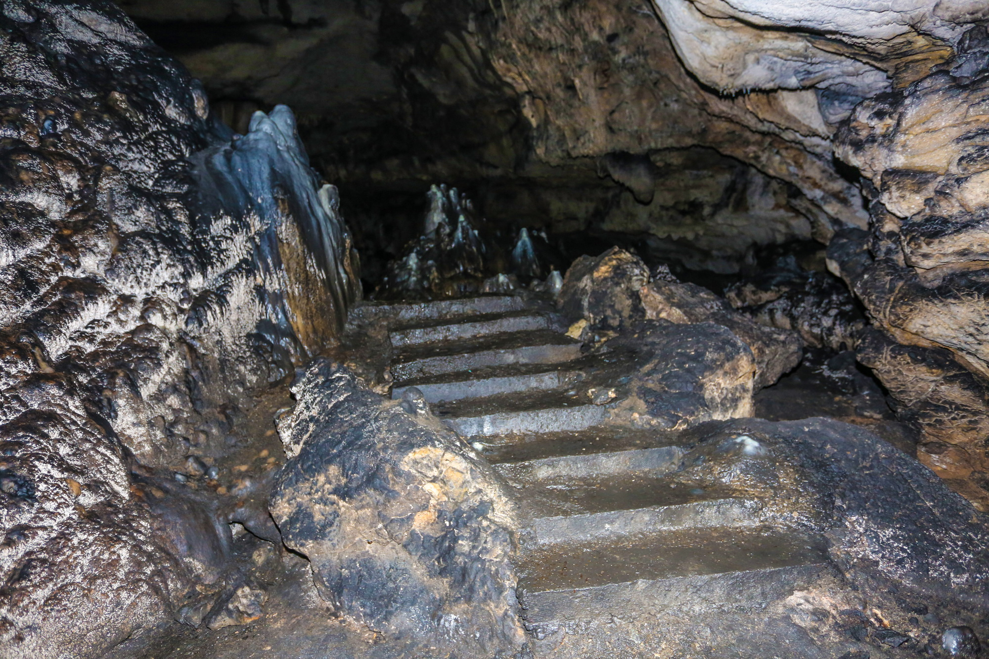 ხომულის მღვიმის ბუნების ძეგლი ღირშესანიშნაობა: ბუნების ძეგლი გამომუშავებულია ქვედაცარცულ კირქვებში. მღვიმე იწყება წამოხურული კარნიზით. შესასვლელის წინ (ზედაპირზე) ჩაქცევით წარმოშობილი ტბაა, რომლის სიღრმე5 მეტრია, გარშემოწერილობა კი 30 მ. ტბა მიწისქვეშა დინებით წყალტუბოს წყალსაცავს უერთდება. 4 მეტრიანი საფეხურით მღვიმე ორ ნაწილად იყოფა. წინა ნაწილი ვრცელია, ფსკერზე - კარსტული ძაბრებით. მეორე ნაწილი ვიწრო ხვრელია, გადაადგილება მხოლოდ ფორთხვით არის შესაძლებელი. მღვიმე მშრალია. შეიმჩნევა დროებით ღვართა ნაკვალევი. გვირაბის ბოლოში პატარა ტბაა. მდებარეობა: წყალტუბოს მუნიციპალიტეტი, სოფ. ხომულის მიდამოები, 160 მეტრი ზღვის დონიდან. კოორდინატები: N42 18.889 E42 38.116